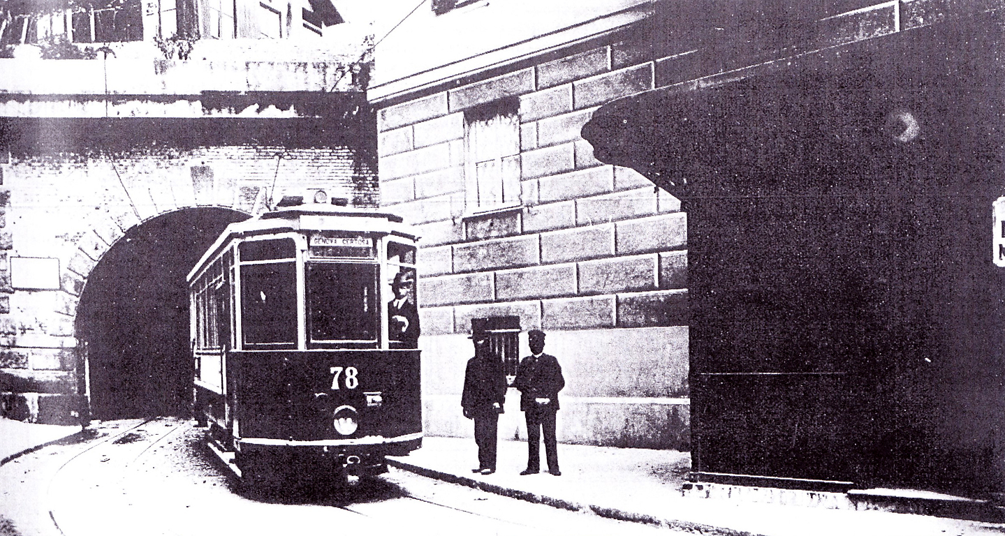 Vettura tranviaria n. 78 della rete di Genova in uscita dall'imbocco sud della Galleria Certosa, proveniente dalla Val Polcevera e diretta verso il centro.